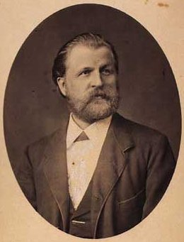 Zakarias Nielsen (1844-1922), dansk lærer, forfatter, digter.